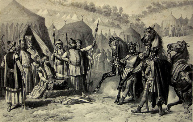 Srpski (latinica): Miloš Obilić posle zavere pred šatorom Muratovim. Pavle Čortanović i Adam Stefanović